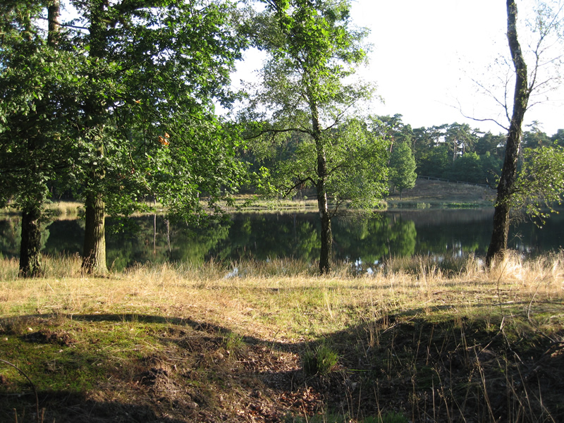 Heideweiher Schwarzes Wasser in Wesel; Bereich ehemals im Naturschutzgebiet „Schwarzes Wasser“, mittlerweile integriert ins Naturschutzgebiet „Diersfordter Wald“ (NSG WES-007)